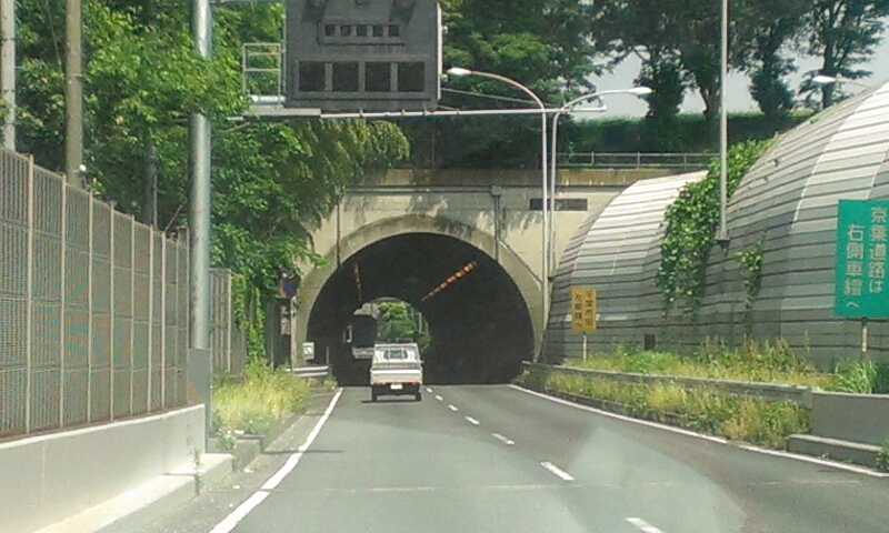 国道16号線貝塚トンネル 東京方面に向けて